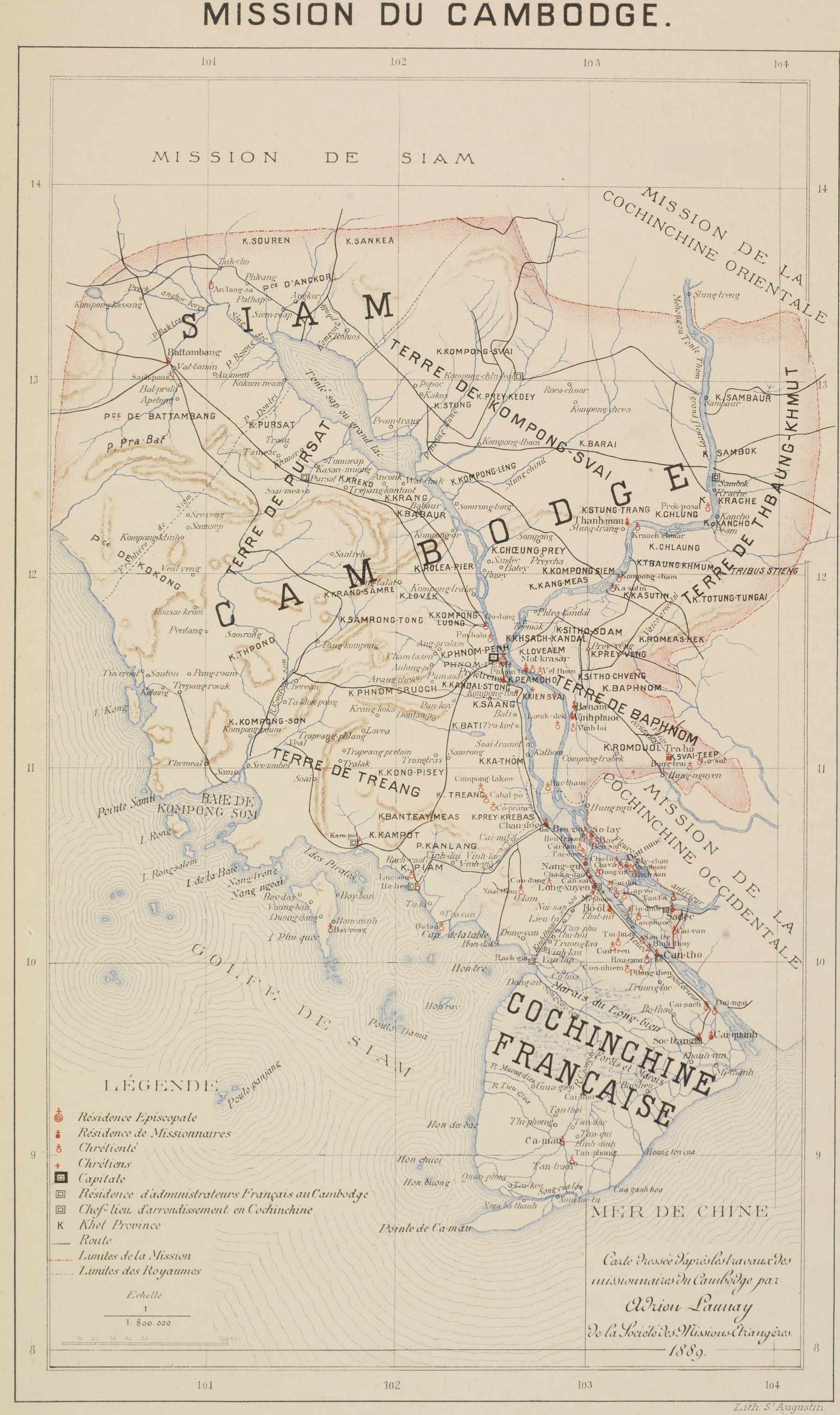 Bản đồ Campuchia vào năm 1889 (năm Pháp hoạch định lại biên giới Nam Kỳ thuộc Pháp và Campuchia).